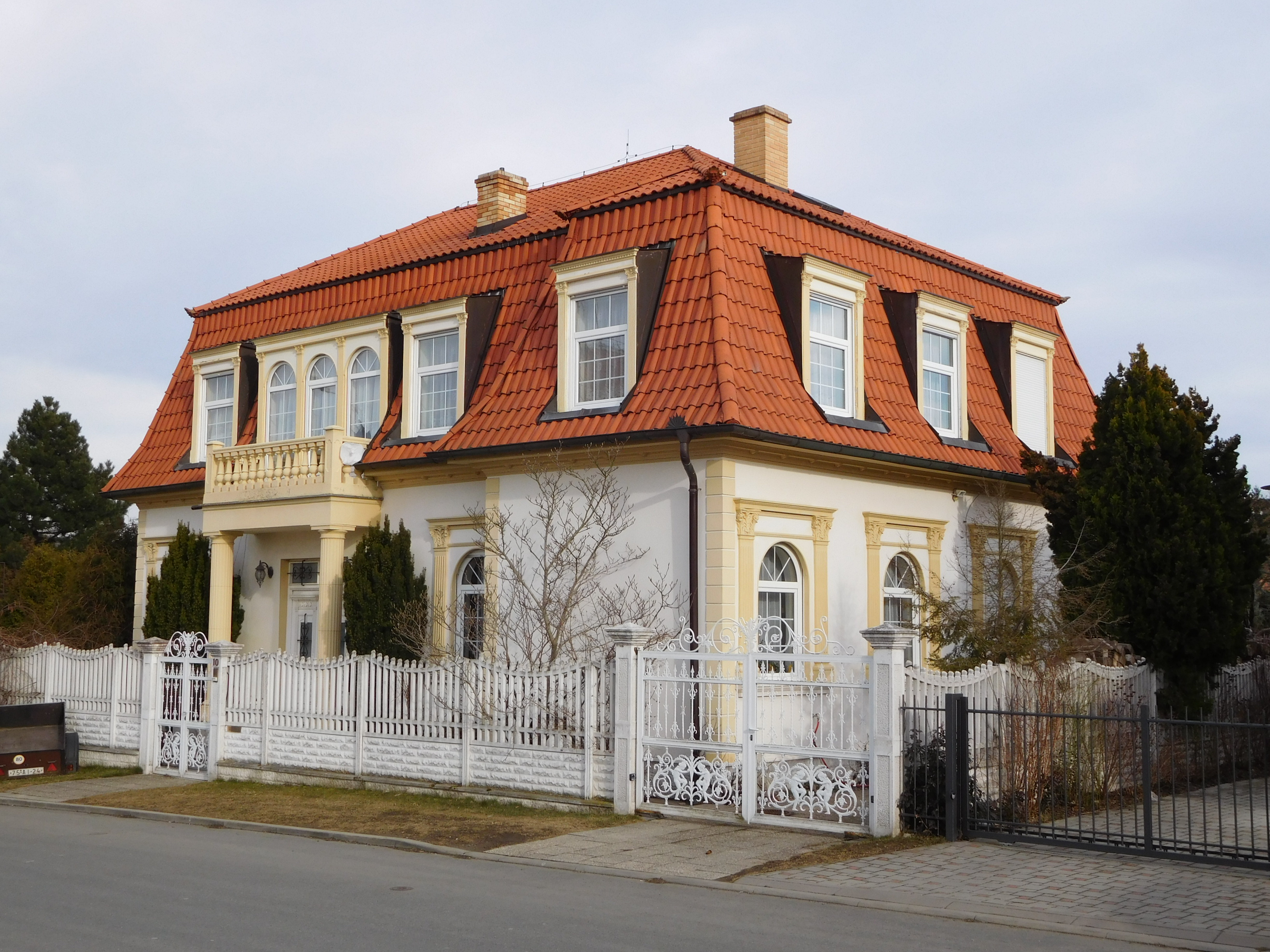 Praha - Kunratice, Úhlavská 10